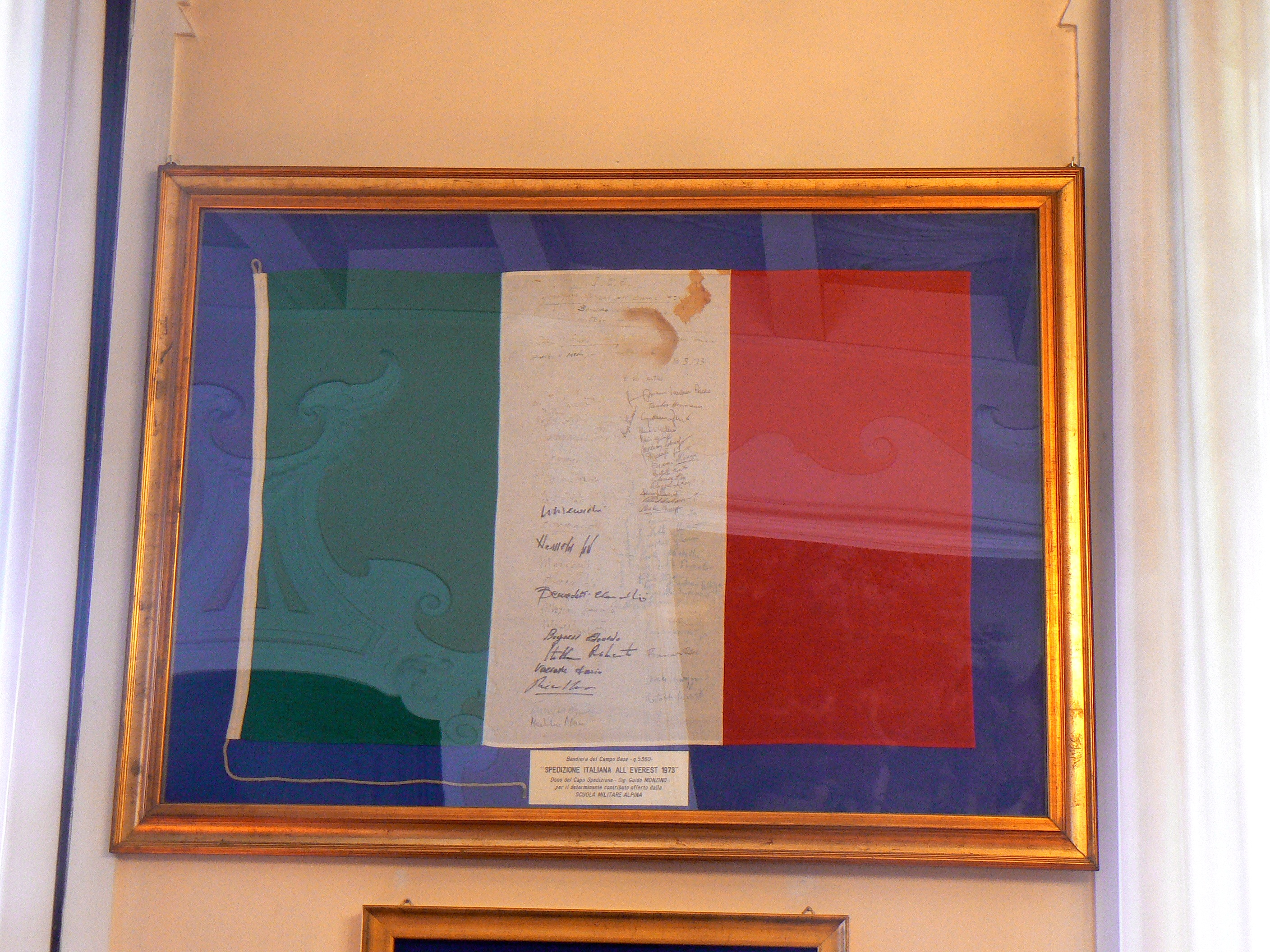 Bandiera della spedizione italiana al Monte Everest del 1973, con le firme dei protagonisti. Conservata nel Museo dell'alpinismo del Castello Jocteau, Aosta, Valle d'Aosta, Italia.